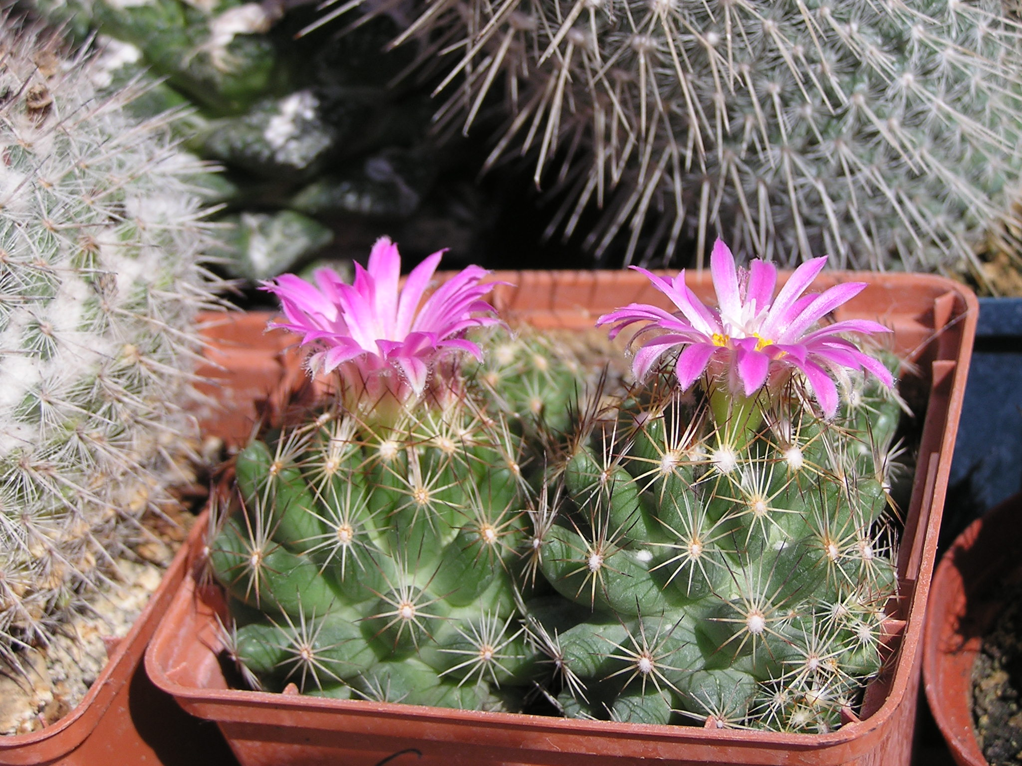 Донецк. Празднование дня города и дня шахтёра. Выставка цветов